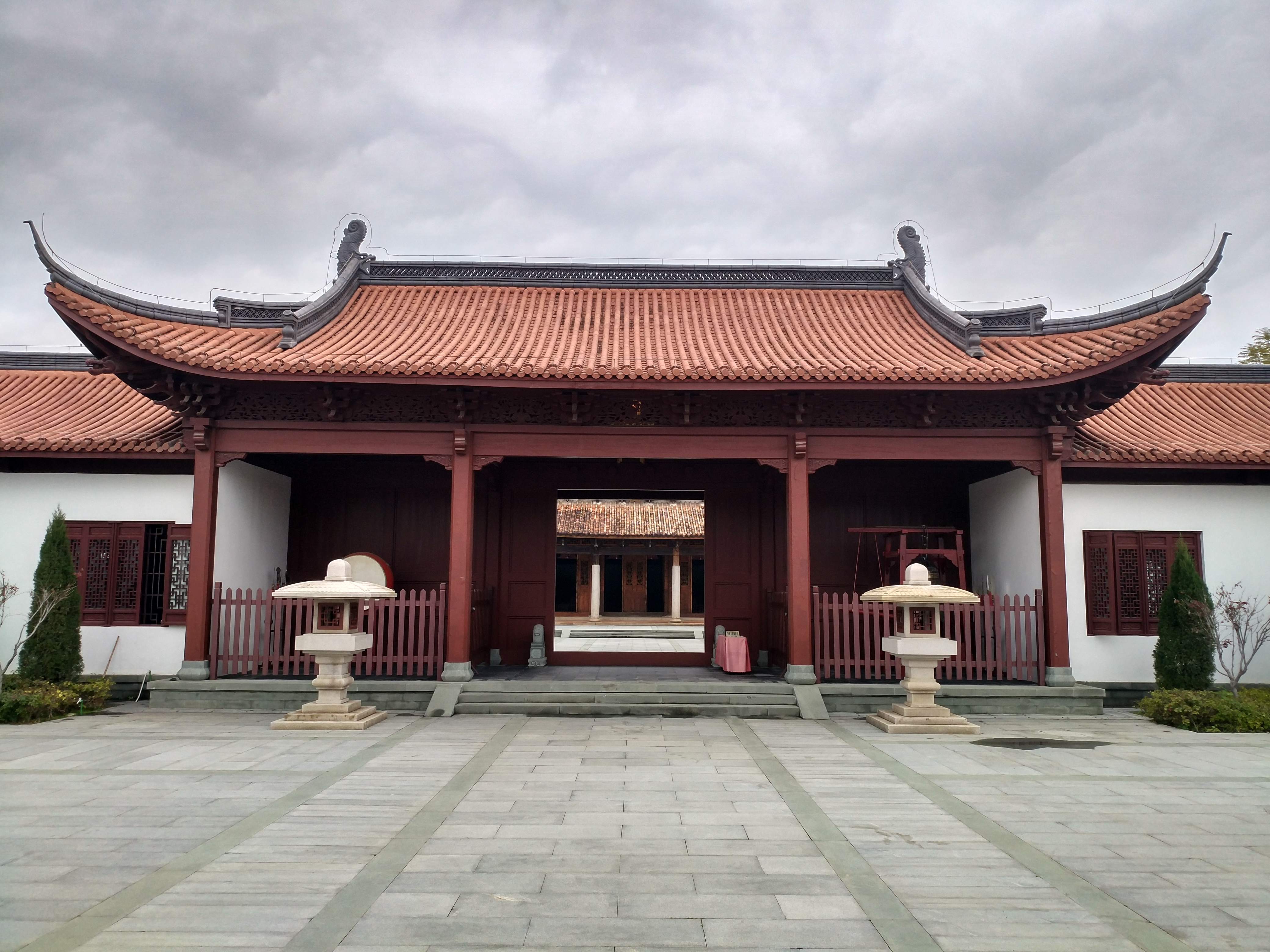 漳浦文庙大成门